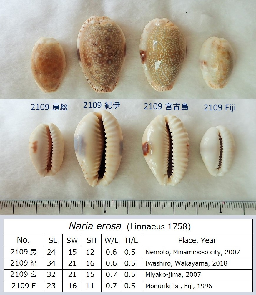 房総半島白浜町根本、紀伊半島岩代、Fiji Tokoriki島の近くの島でひろった貝と、宮古島から購入した貝。